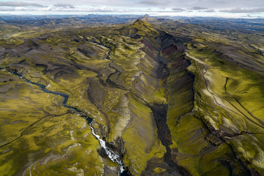 Эльдгьяу